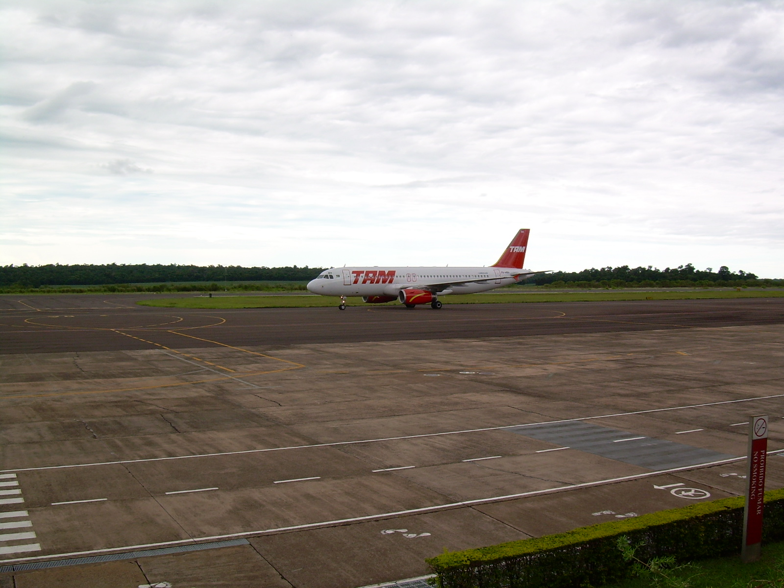 Avião da Tam taxiando em Foz